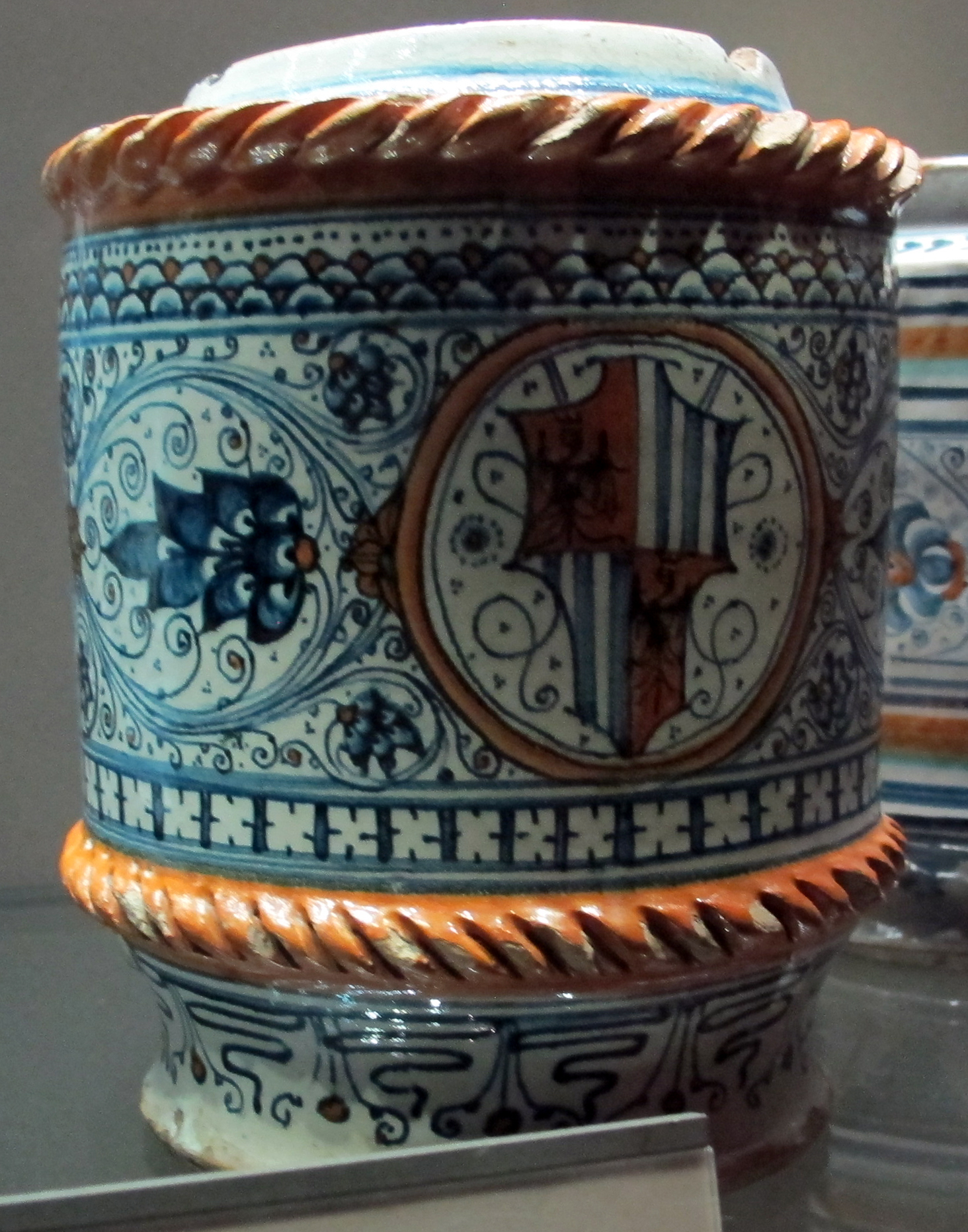 Maiolica in the Louvre